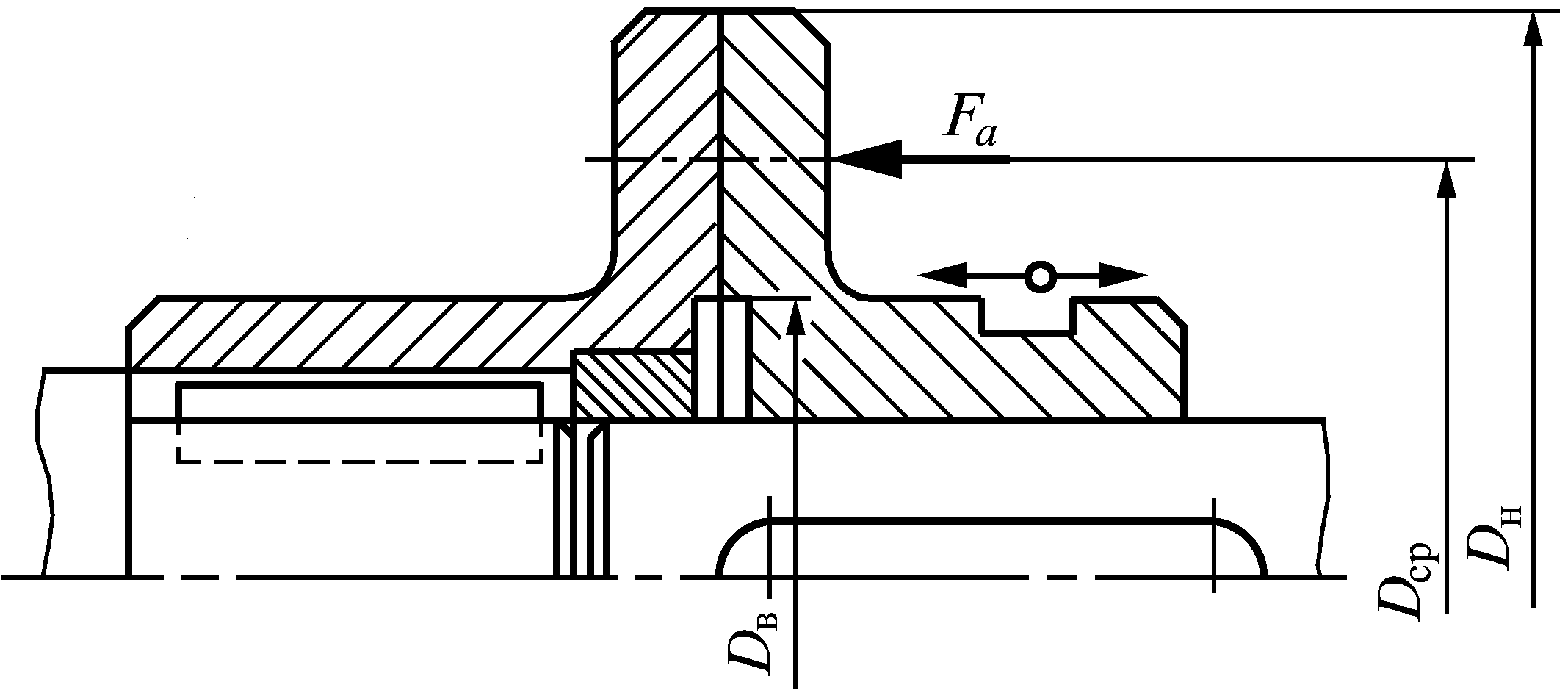 Предмет